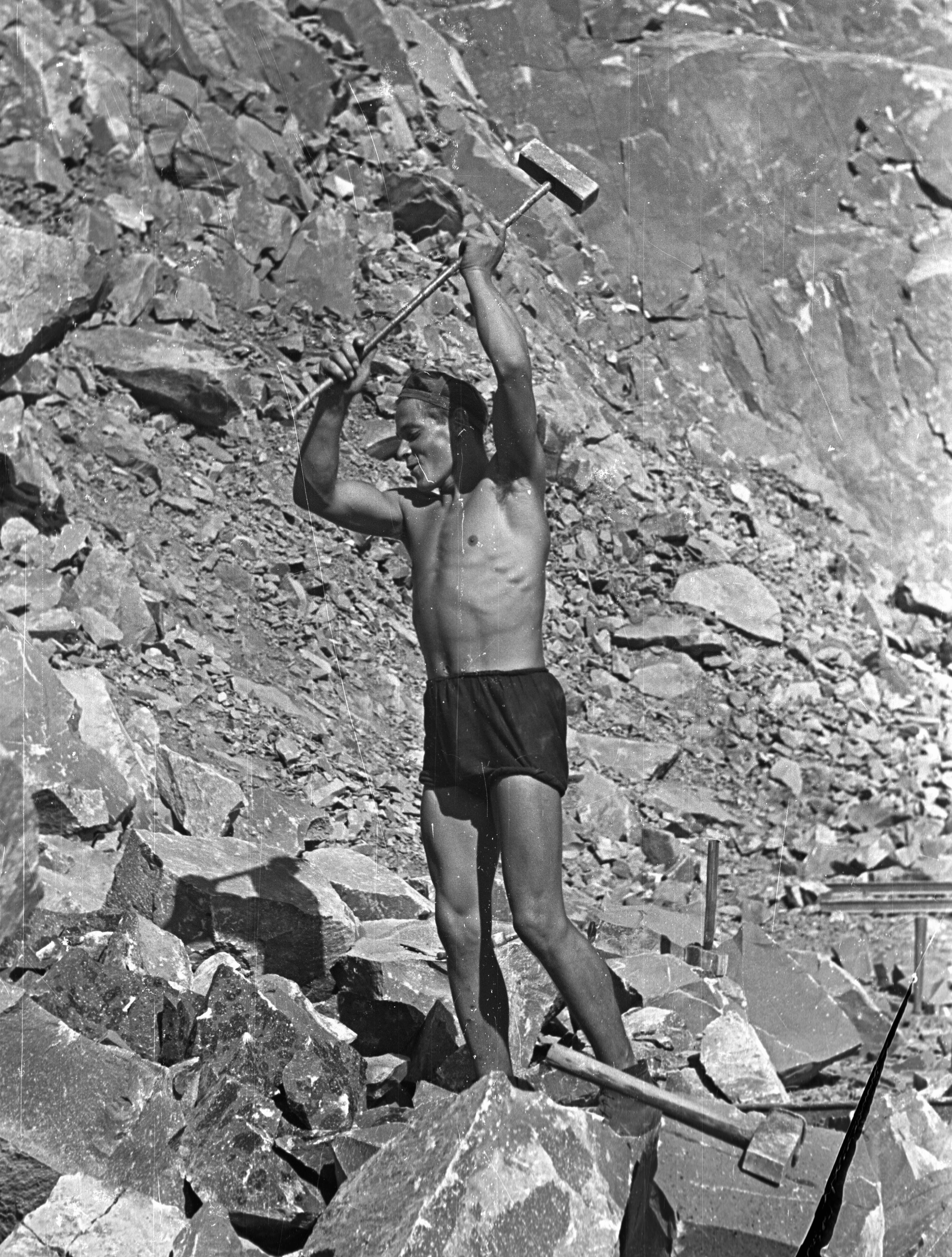 Félmeztelen férfi kalapáccsal Mulató-hegy, kőbánya. Location: Hungary, Erdőbénye Tags: mining, stone mine Title: Mulató-hegy, kőbánya.